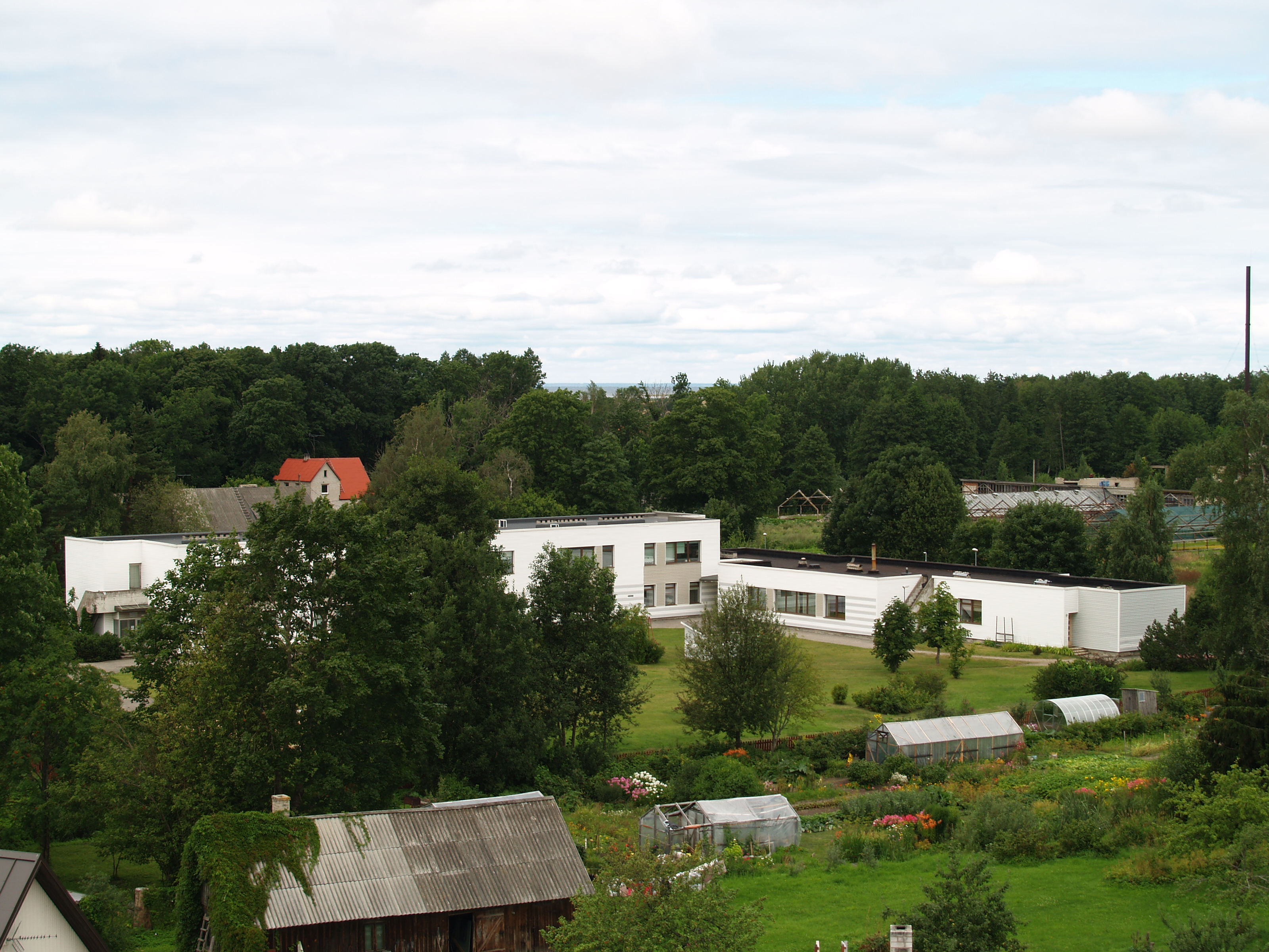 Häädemeeste Lasteaed kirikutornist pildistatuna.